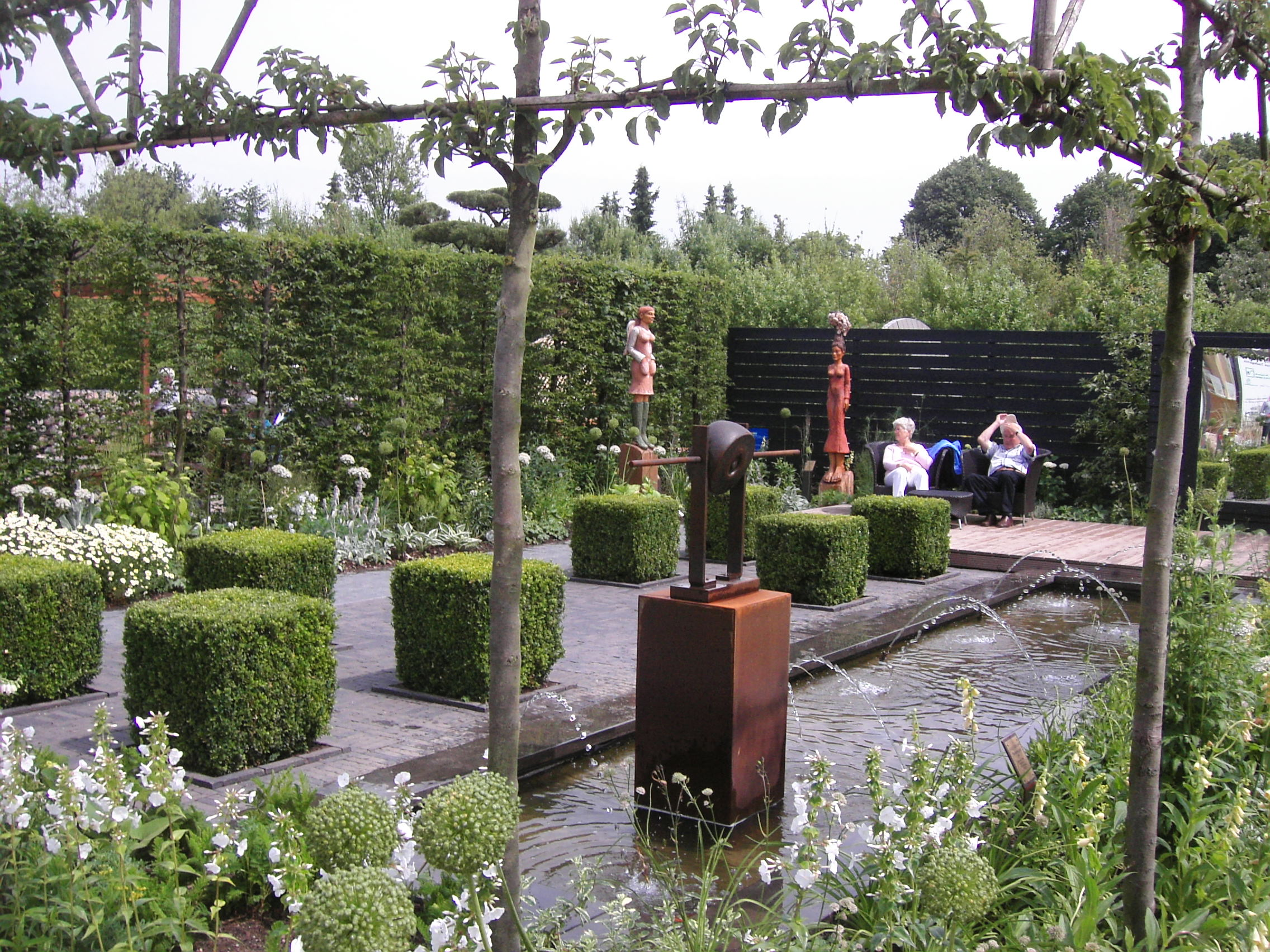 Themengärten